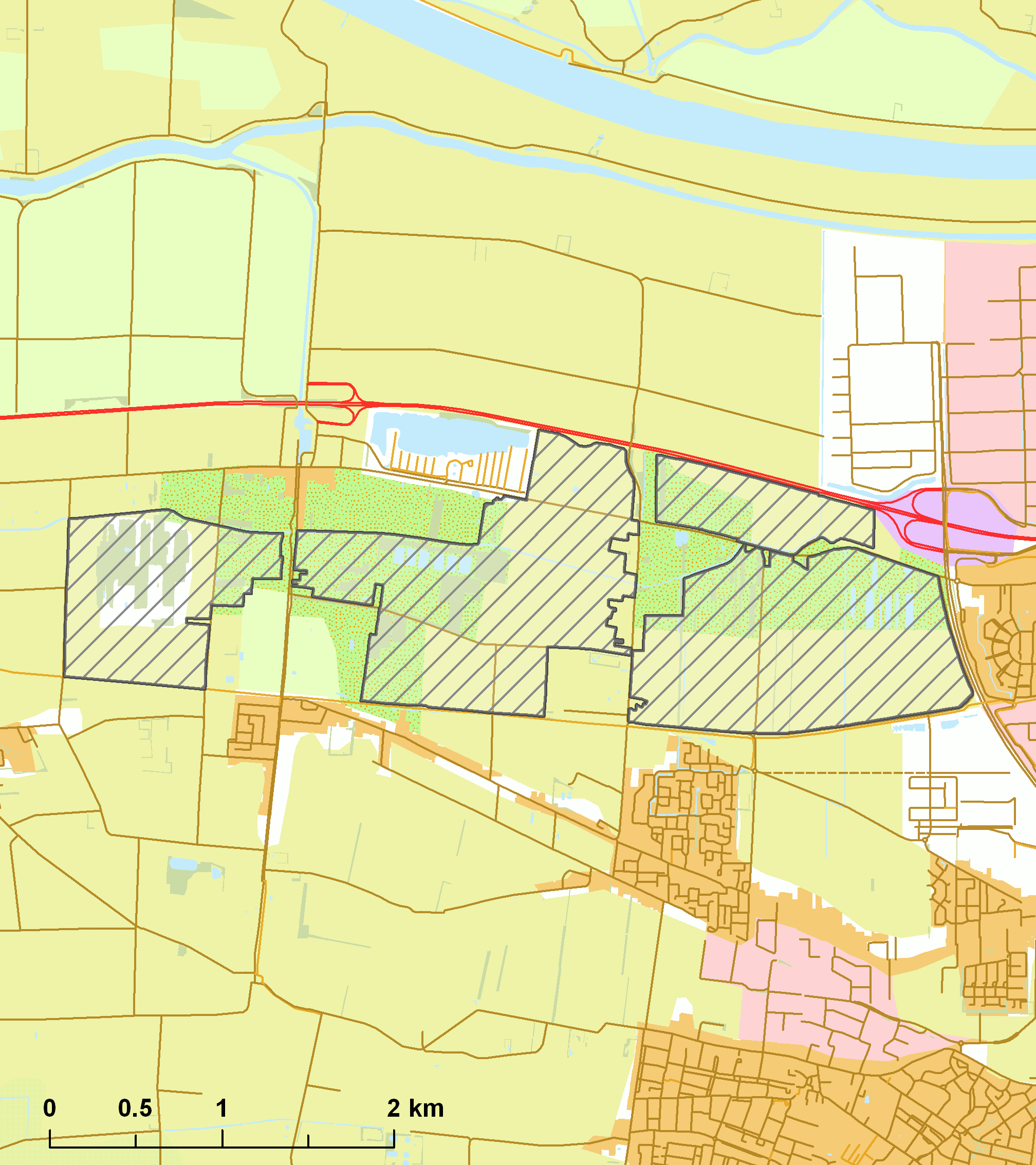 Natura2000 - Langstraat.png